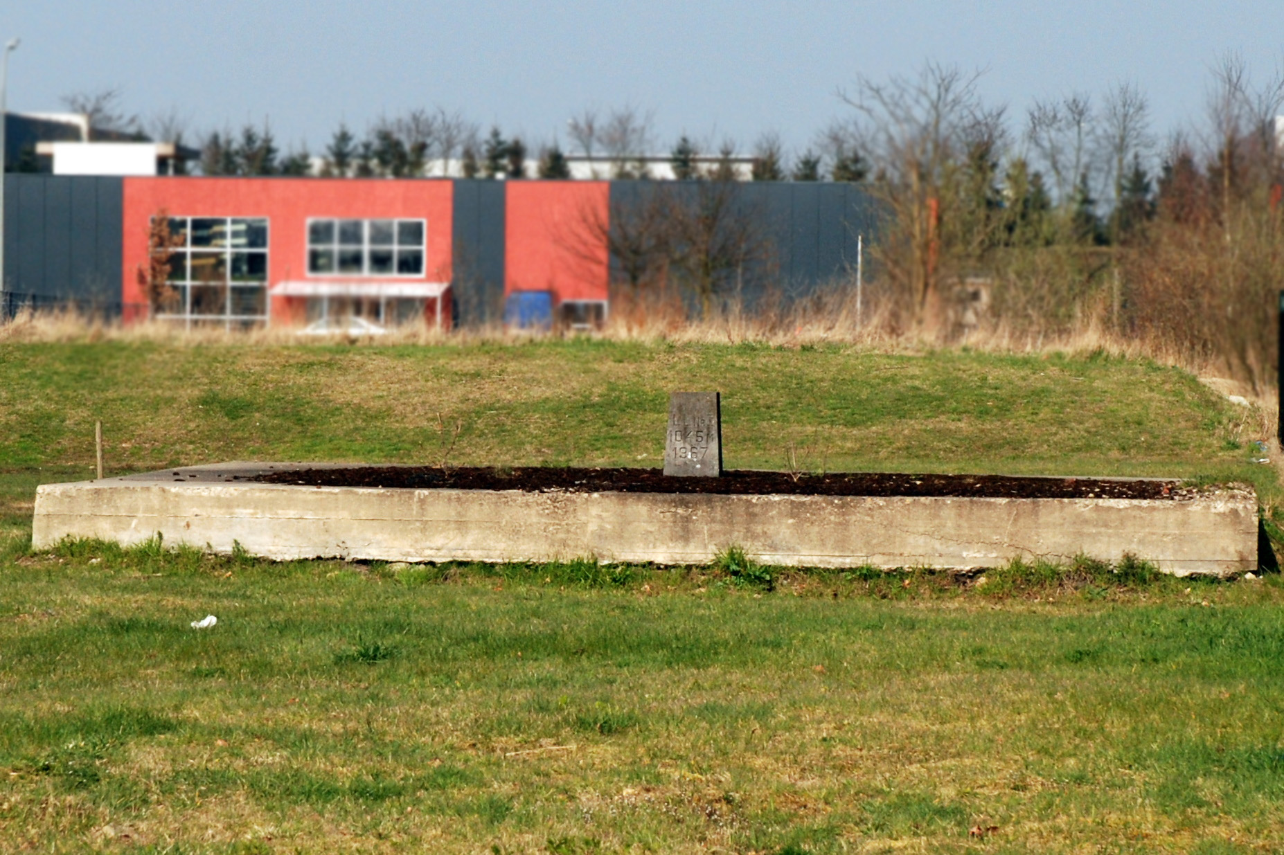 Steen op de plaats van een van de mijnschachten van de steenkoolmijn van Zwartberg, België